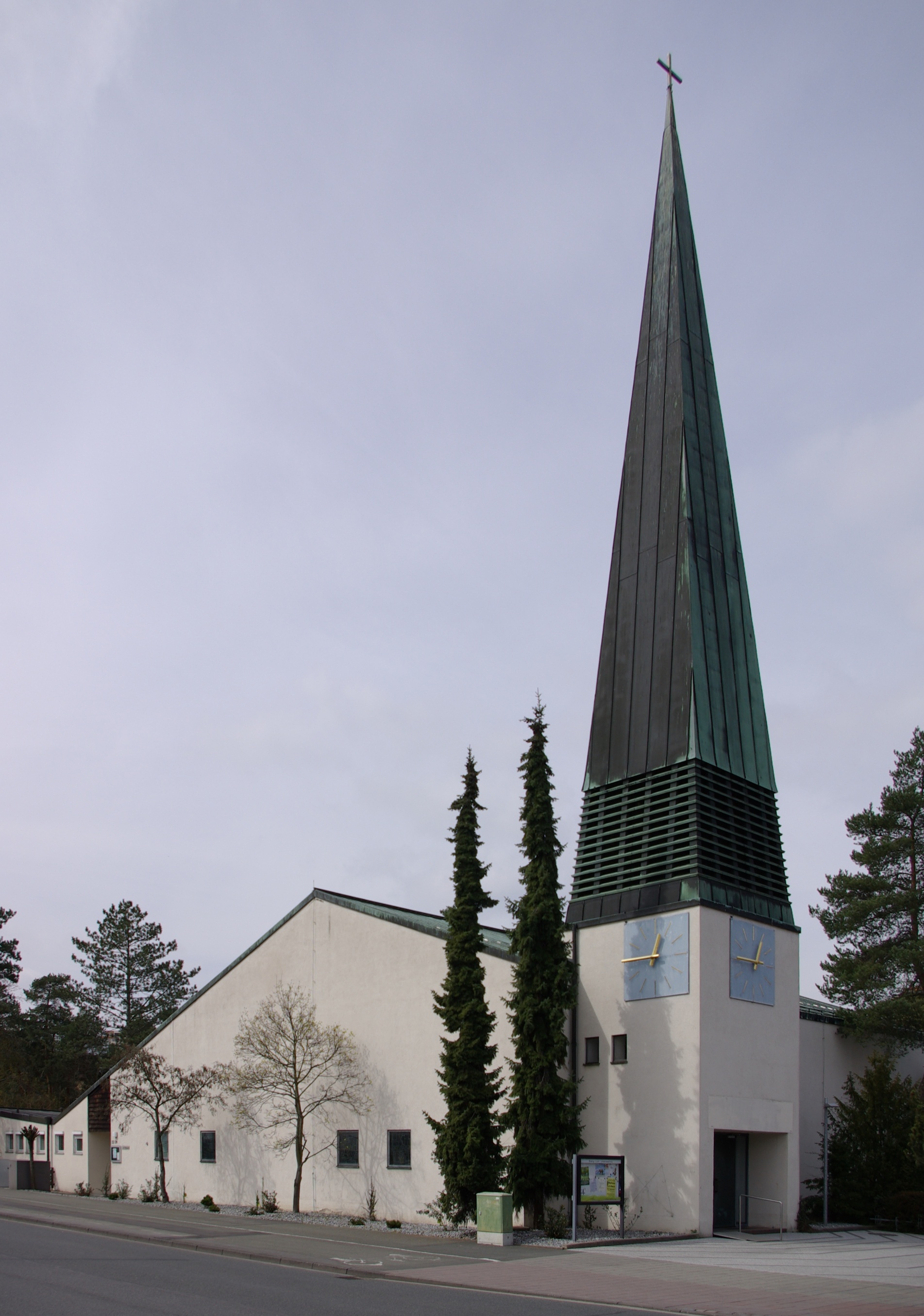 Johanneskirche im Erlanger Stadtteil Alterlangen